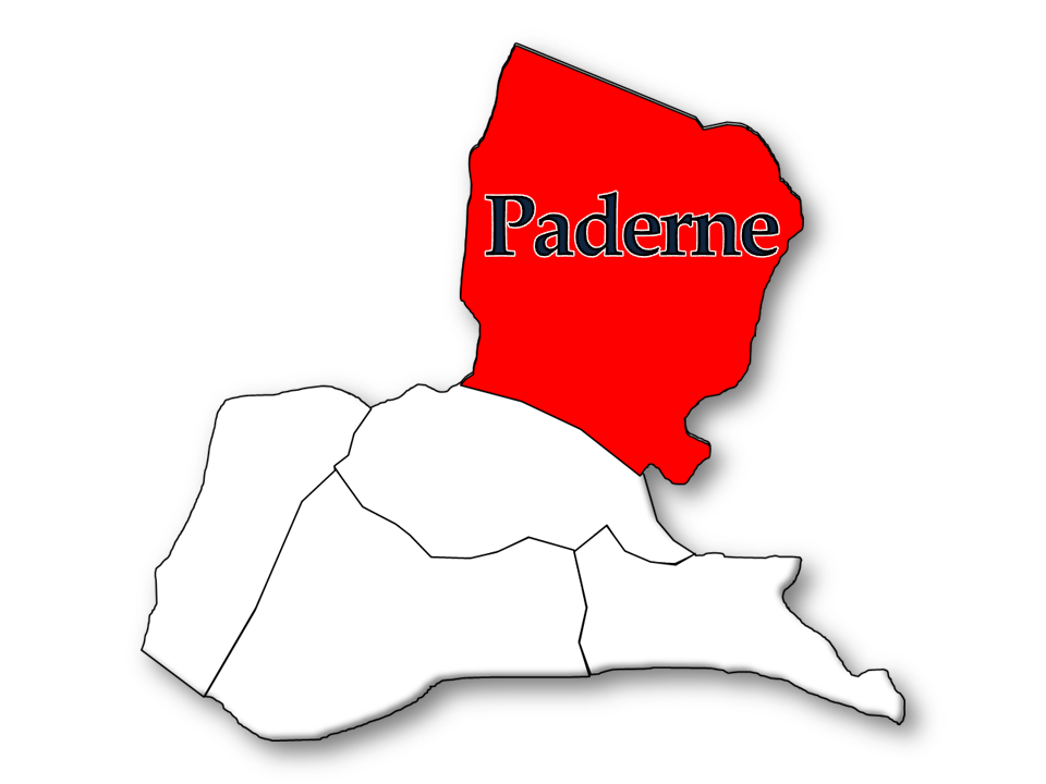 Censos 1864/2011